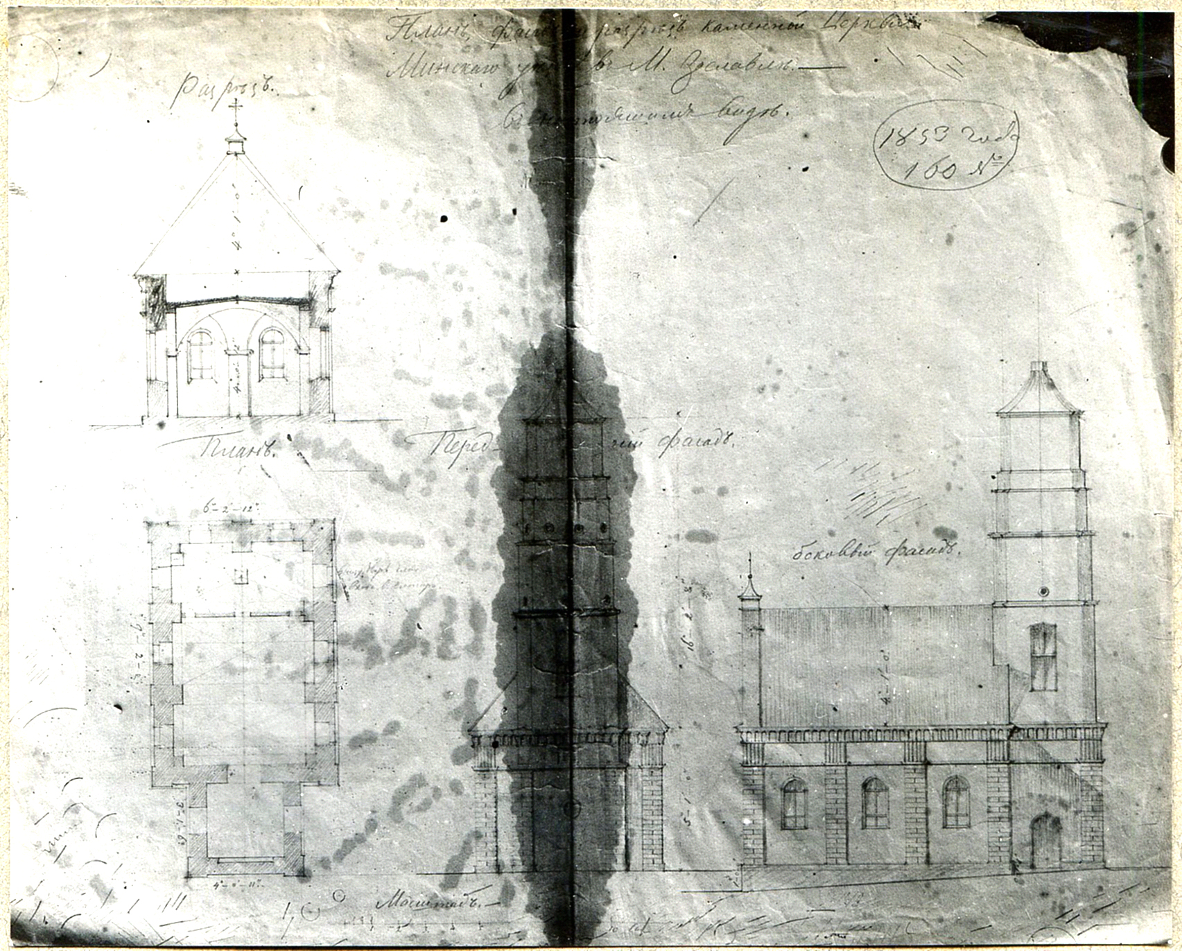 Беларуская (тарашкевіца): Заслаўе (Zasłaŭje), вуліца Замкавая (vulica Zamkavaja). Кальвінскі збор